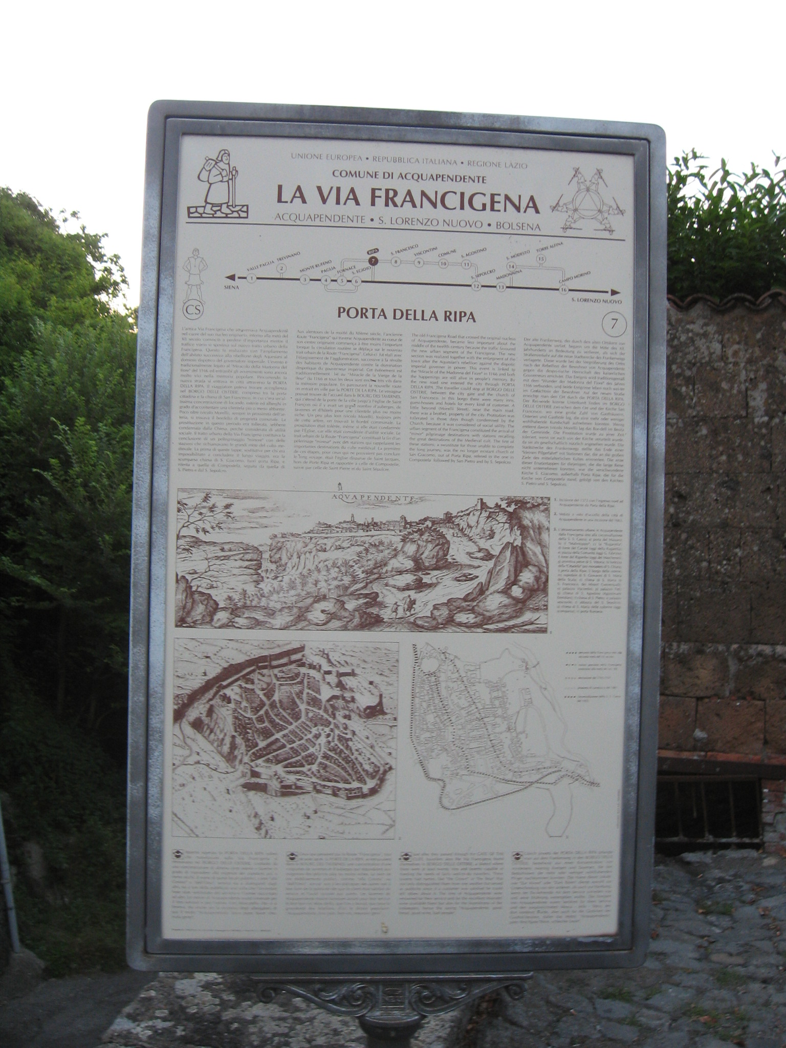 cartello illustrativo sulla Francigena